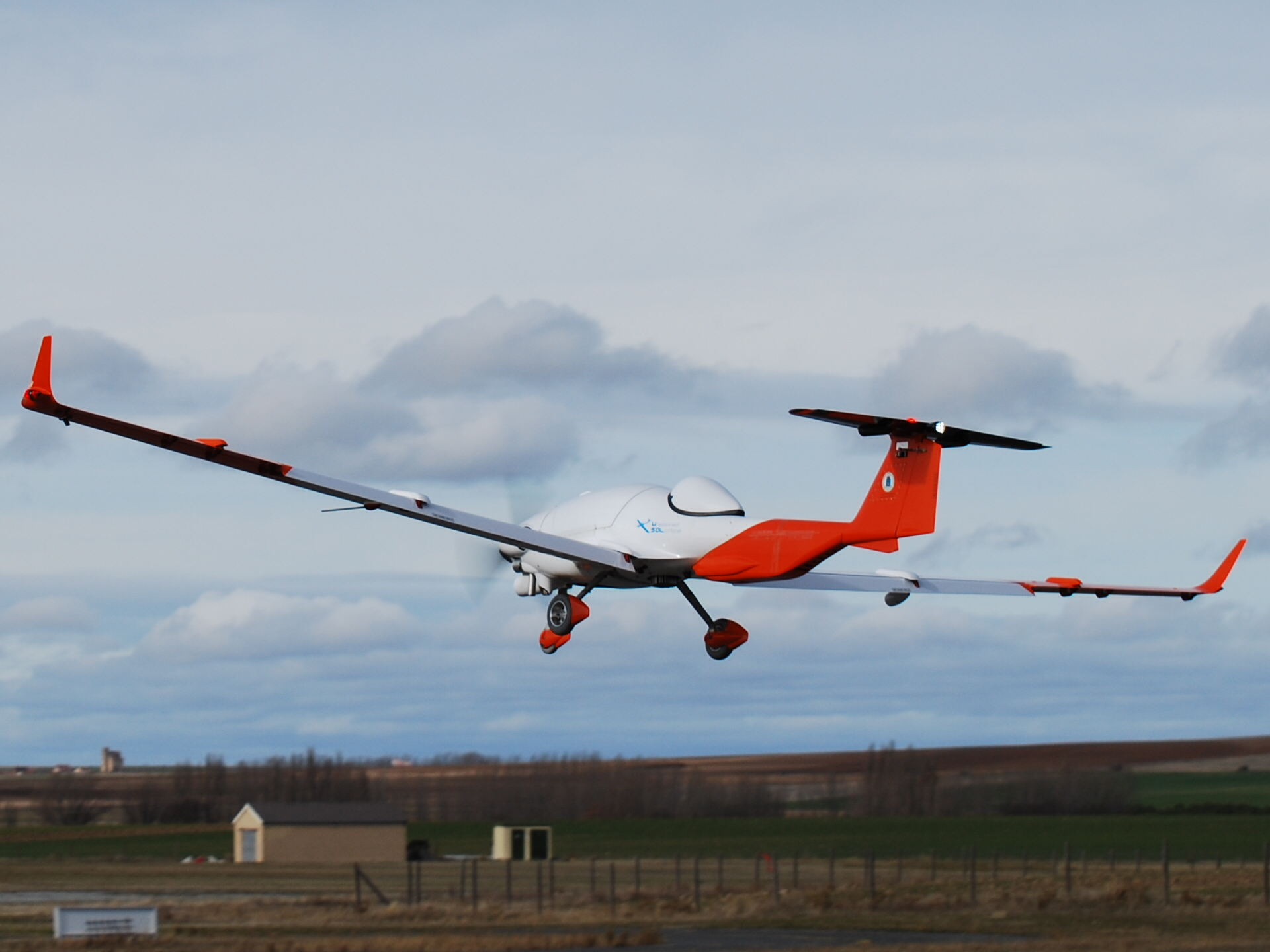 Foto en vuelo del UAS K2B6 USOL